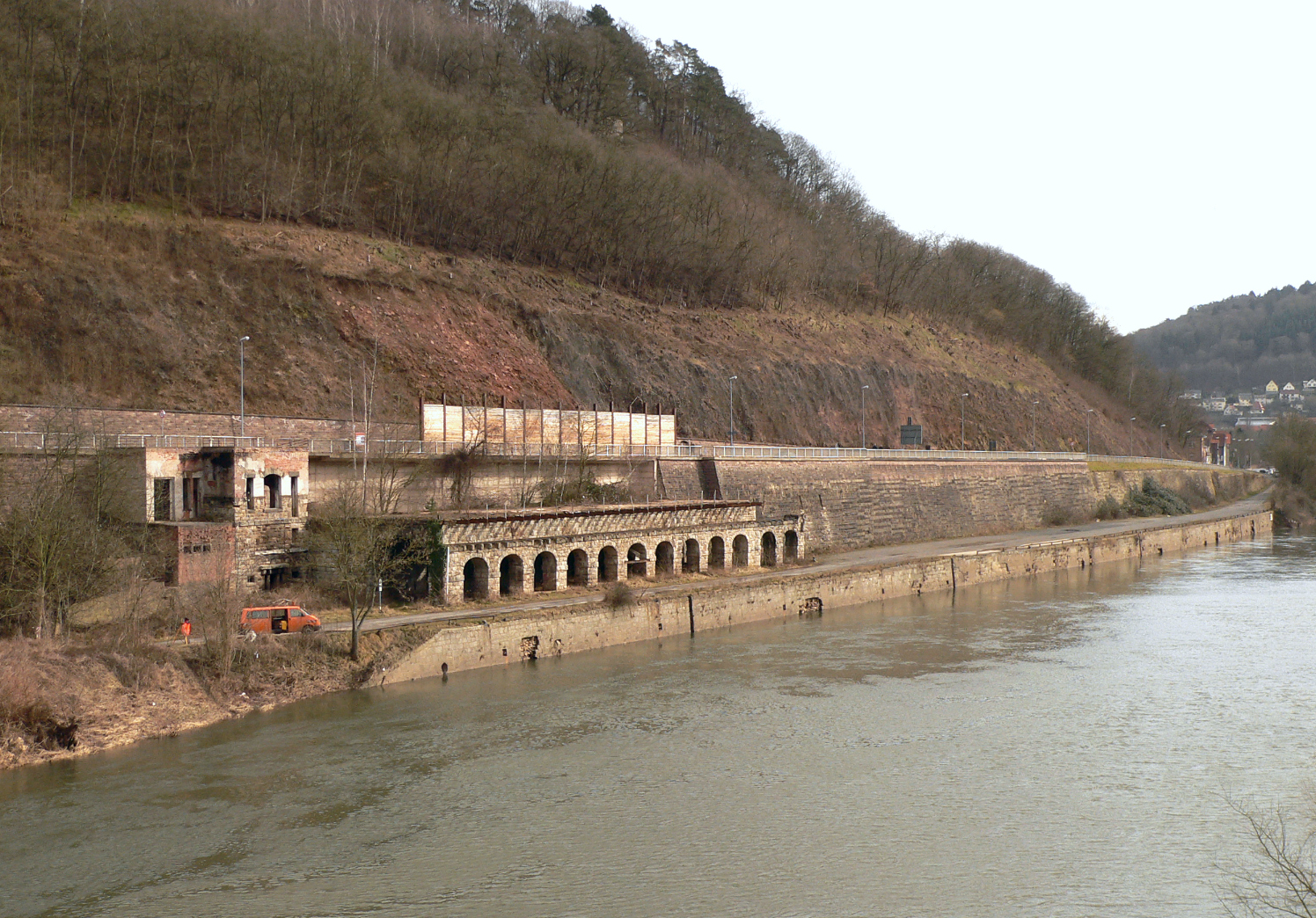 Weserumschlagstelle